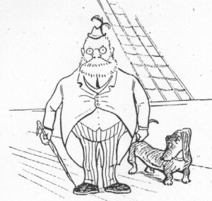 Von Pilsener y su perro, Dudelsackpfeifergeselle. Caricatura de Luztig, seudónimo de Pedro Subercaseaux.